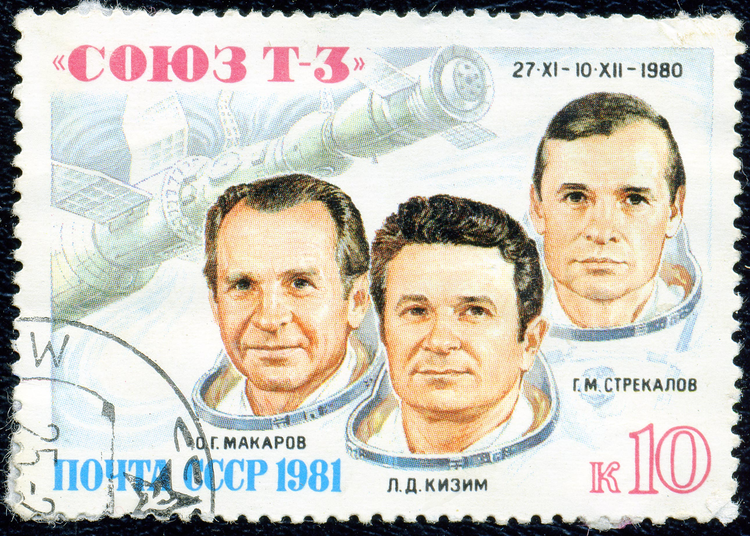 Почтовая марка СССР. 1981. Союз Т-3, О.Г. Макаров, Л.Д. Кизим, Г.М. Стрекалов